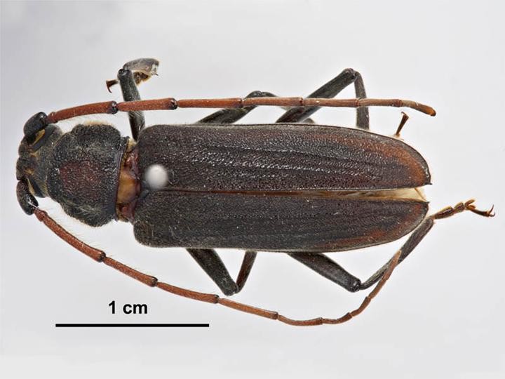 Stromatium barbatum